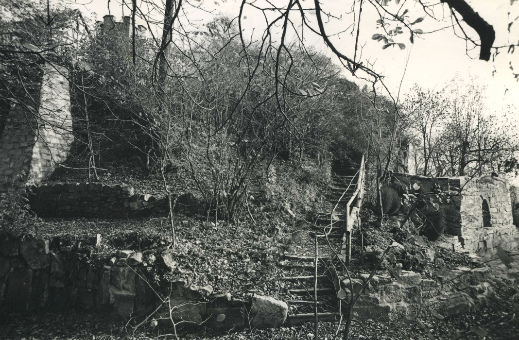 Wallgraben mit teilweise wieder aufgebautem Wächterturm, Burg Königsberg i. Bay., 1972.